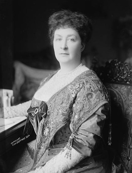 Emma Eames (1865 - 1952), opera soprano.